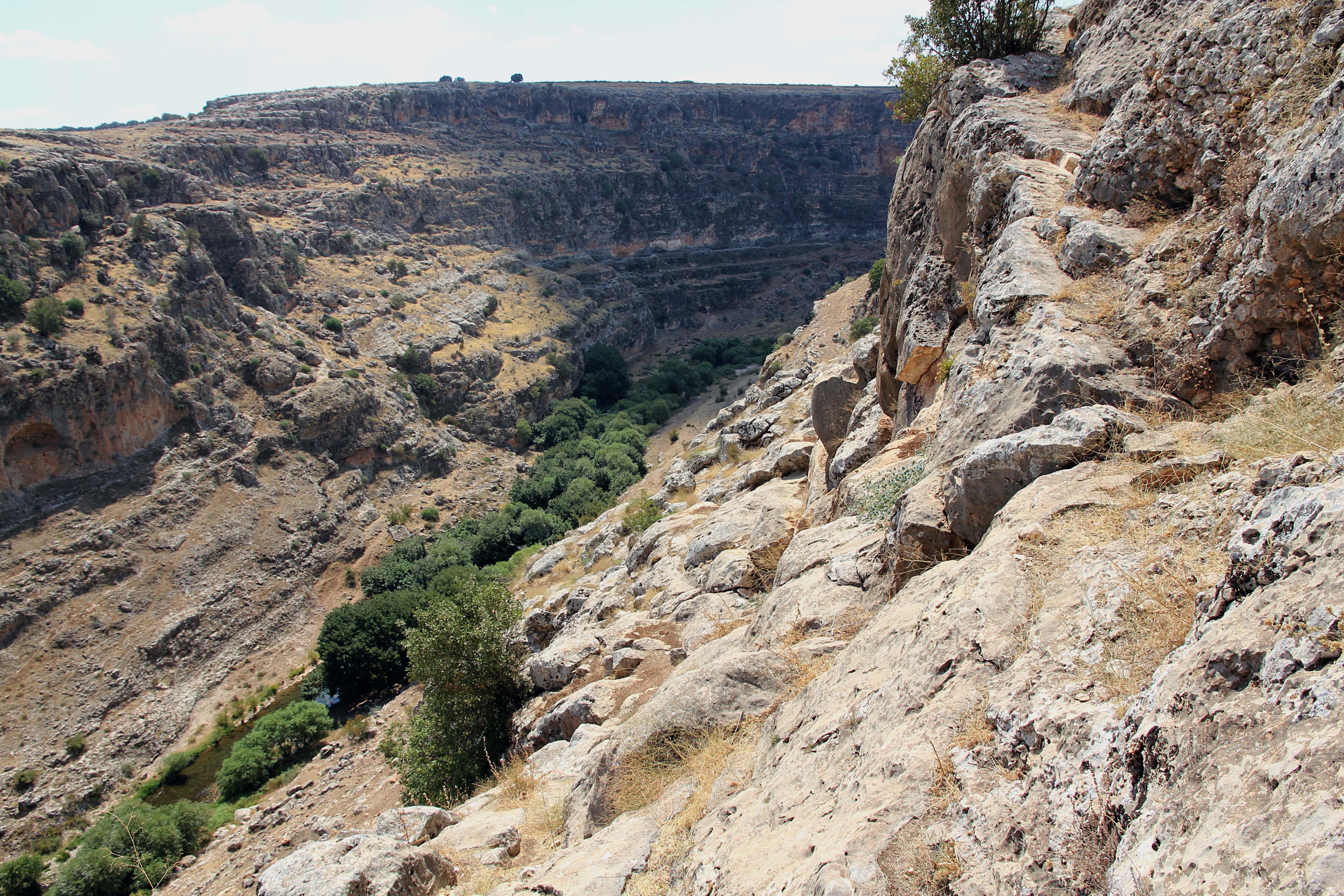 Späthethitisches Felsrelief am Karasu, türkische Provinz Gaziantep